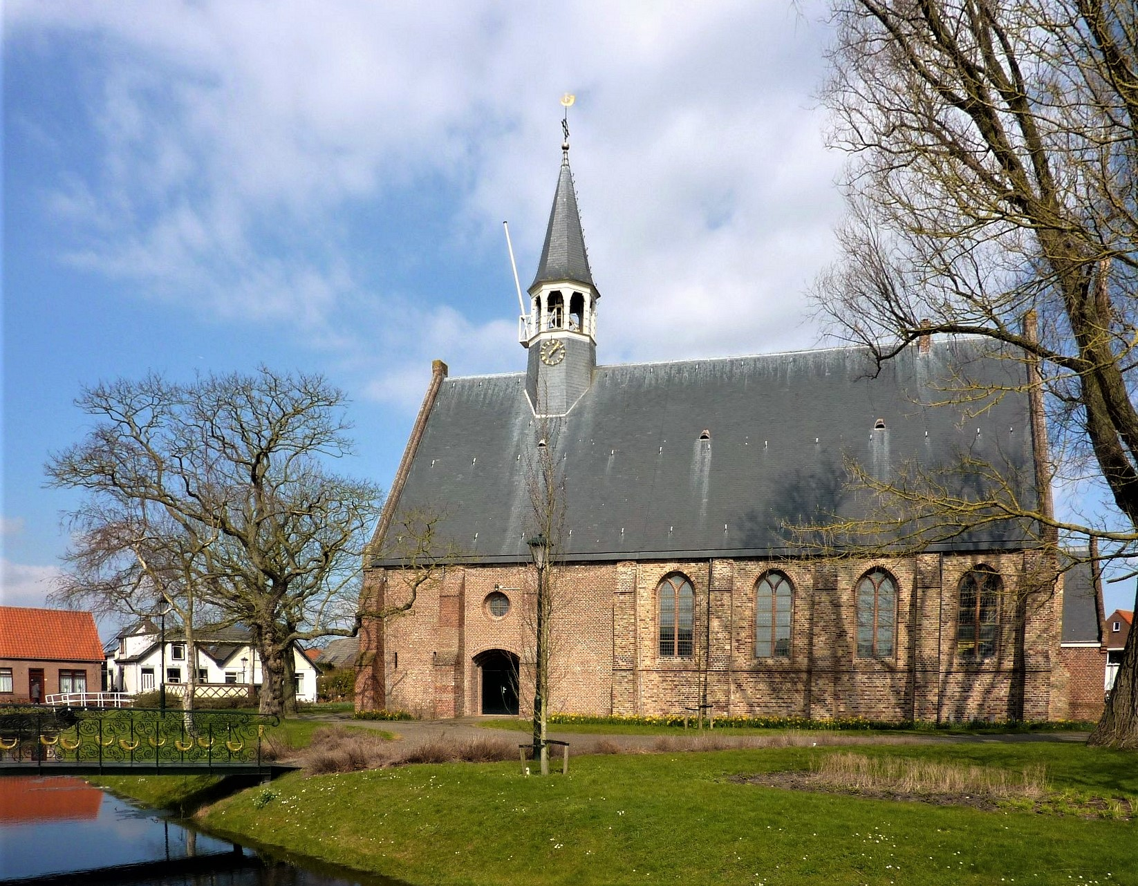 Hervormde Kerk, Oudenhoorn